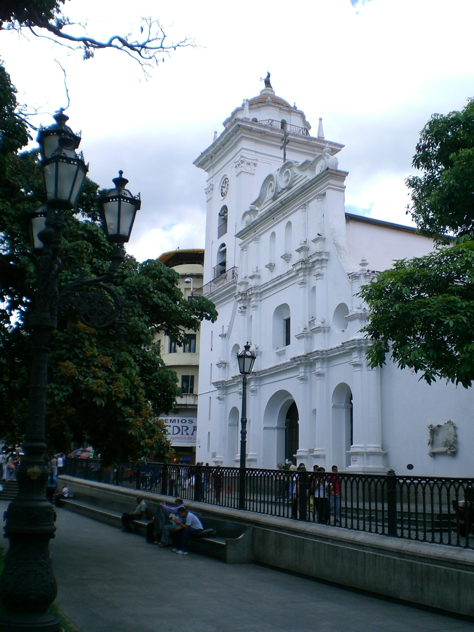 Caracas Cathedral, Caracas, Venezuela